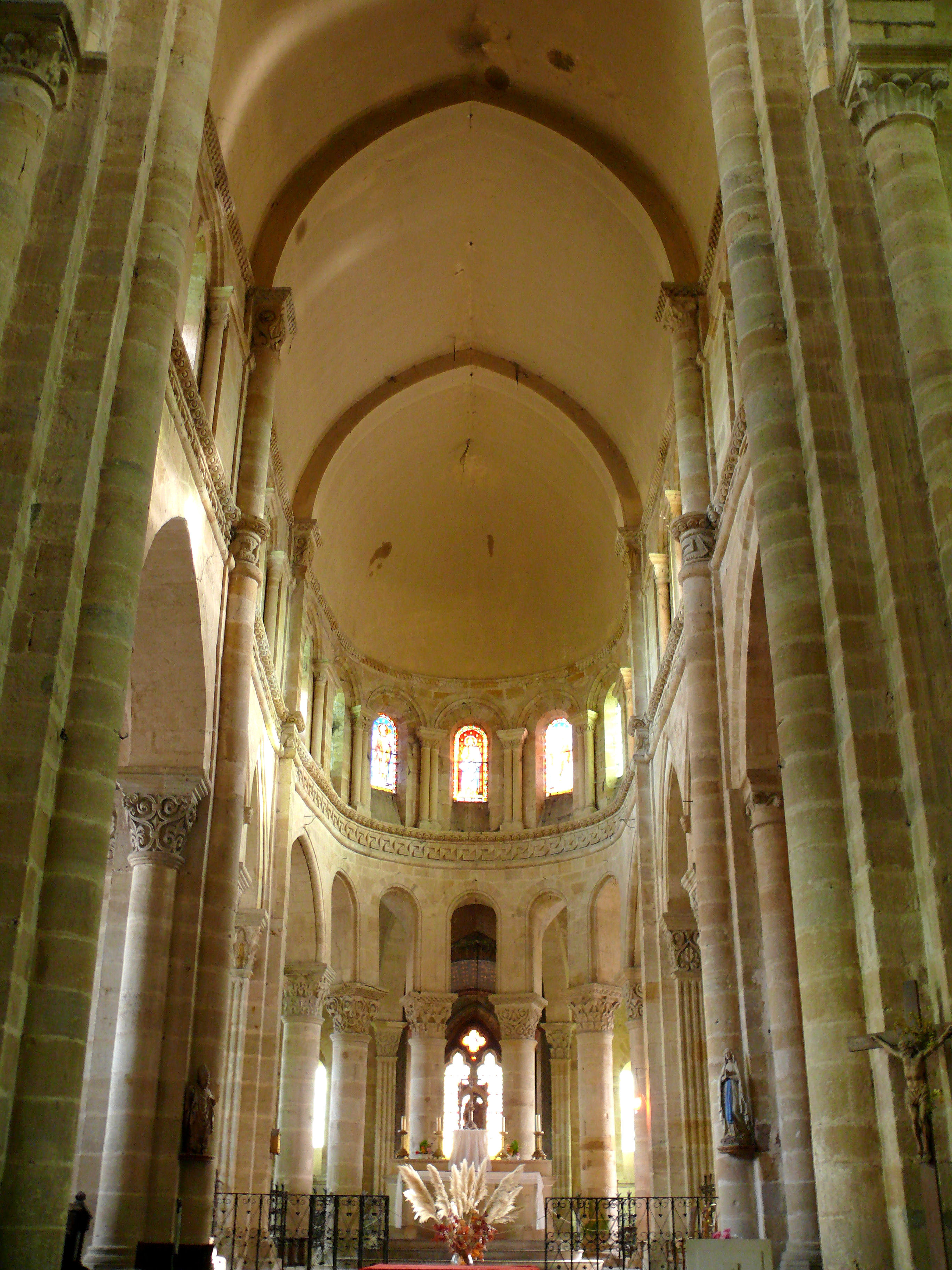 Saint-Menoux - Église Saint-Menoux - Ensemble du chœur .